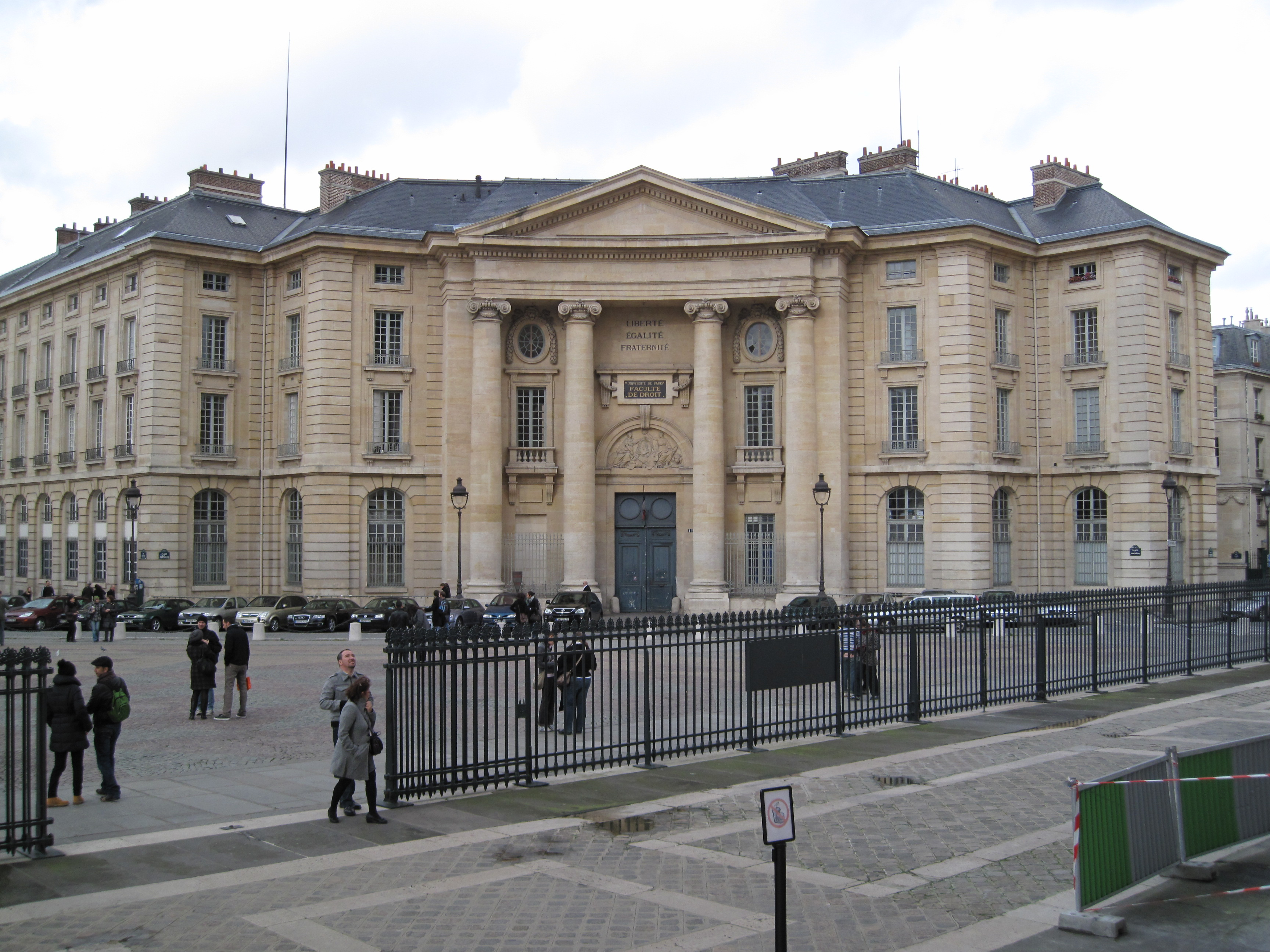 Les locaux de l' Université Paris I Panthéon - Sorbonne et de Paris II Panthéon-Assas sont répartis principalement en plusieurs centres. Cette photographie représente l' entrée principale du Centre Panthéon qui est dédié aux sciences juridiques. Au dessus de la porte, on peut distinguer une plaque sur laquelle est inscrit "Université de Paris Faculté de Droit". Cette inscription date de l'époque où l' Université de Paris n'avait pas été encore divisée en plusieurs Universités. Les locaux du Centre Panthéon accueillaient la Faculté de Droit de L' Université de Paris. Place du Panthéon, Paris, France.